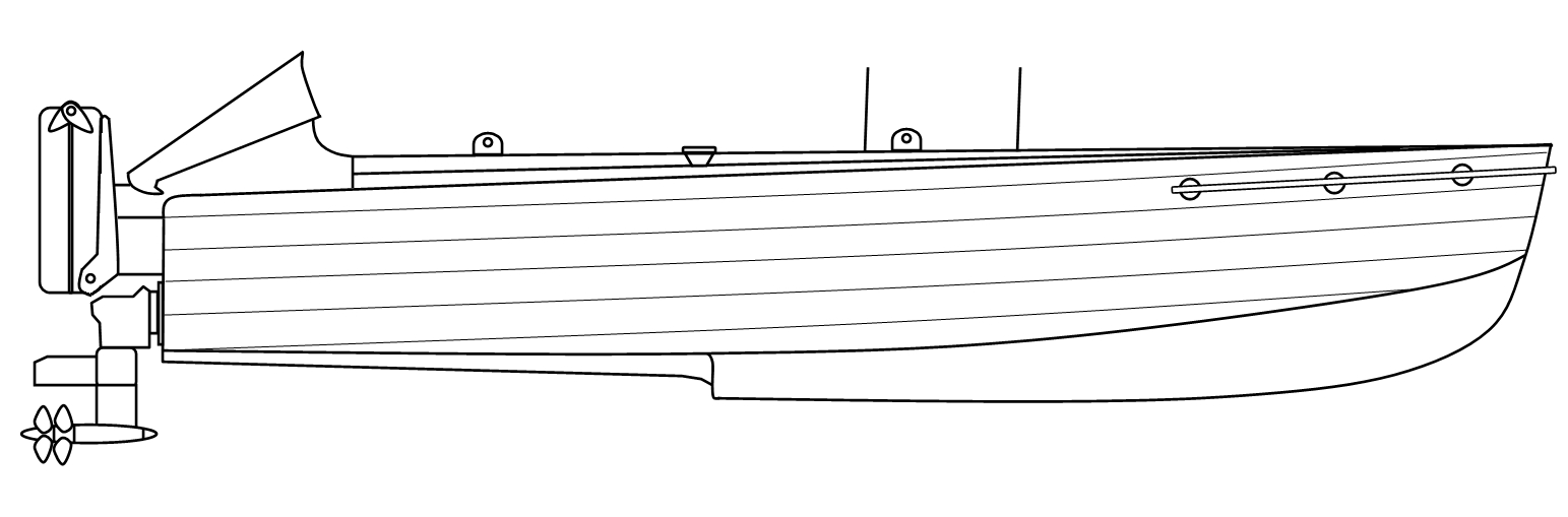 Italienisches Sprengboot M.T.